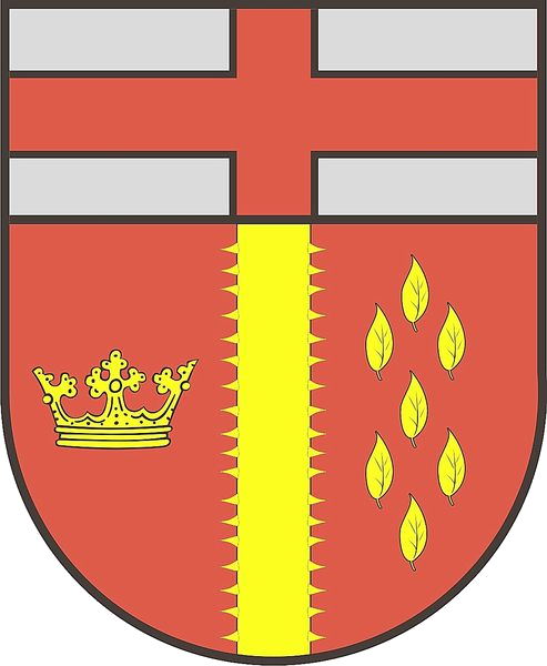 Wappen der Ortsgemeinde Etteldorf. Wappenbeschreibung: "Unter silbernem Schildhaupt mit durchgehendem rotem Kreuz in rot goldener Dornenpfahl, vorn goldene, dreizackige Krone, hinten sieben goldene Erlenblätter." Siehe [1]